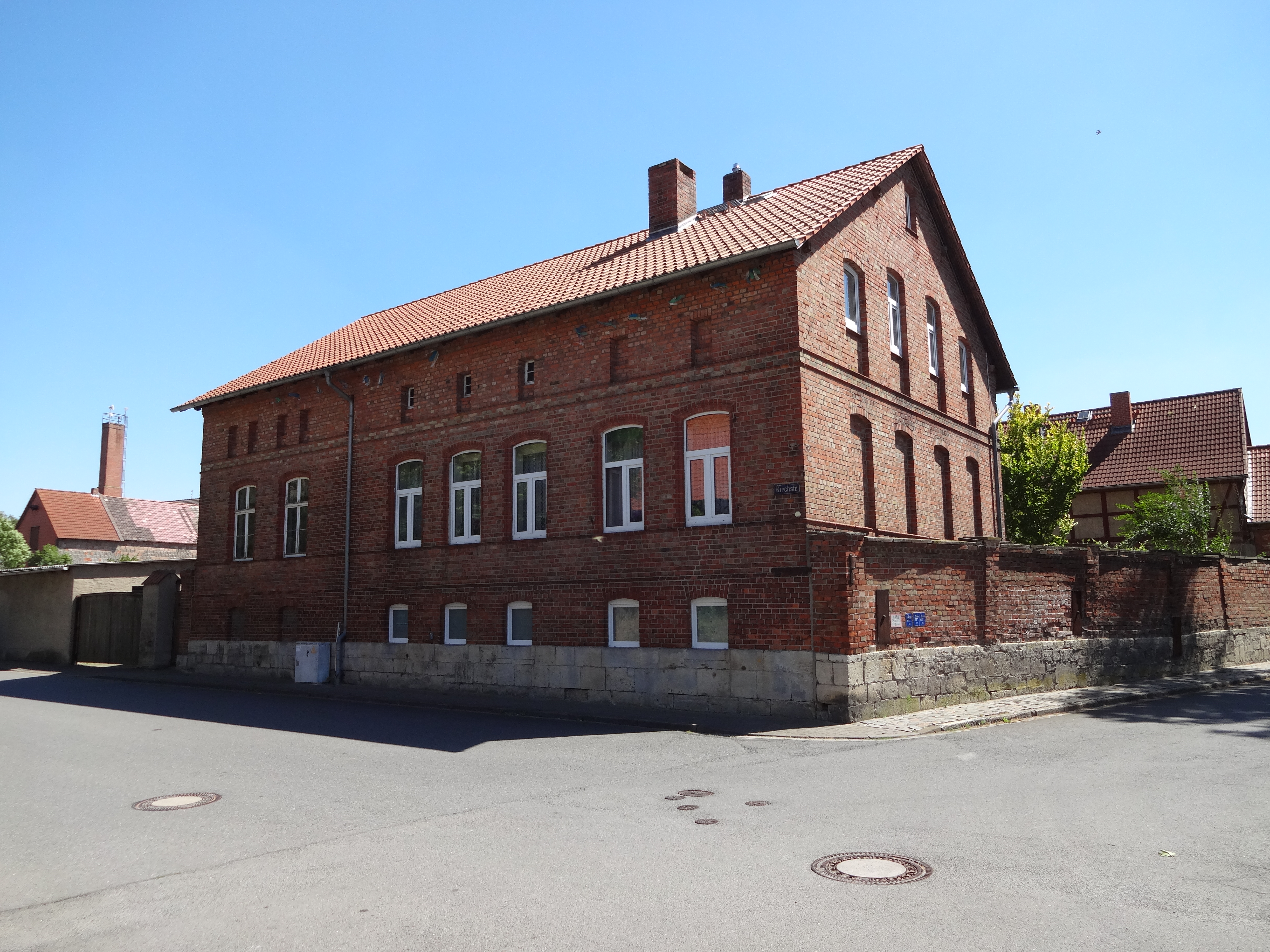 denkmalgeschützte ehemalige Schule in der Kirchstraße 3 in Dedeleben